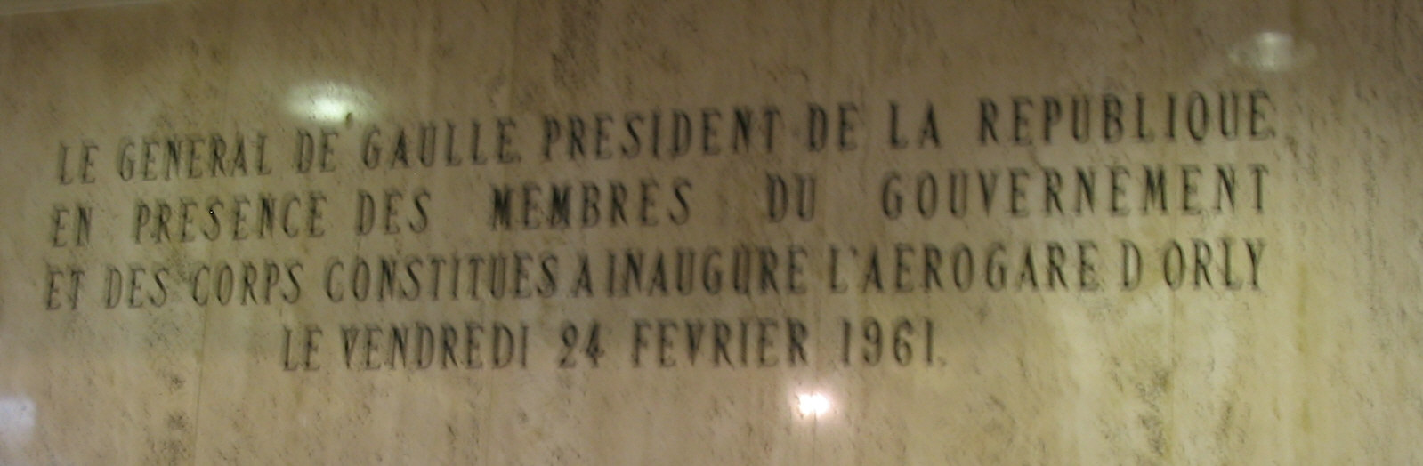 Plaque commémorative (1961) de l'inauguration de l'aérogare d'Orly Sud par le Général de Gaulle, Président de la République, et les corps constitués. Je suis l'auteur du cliché pris en septembre 2006